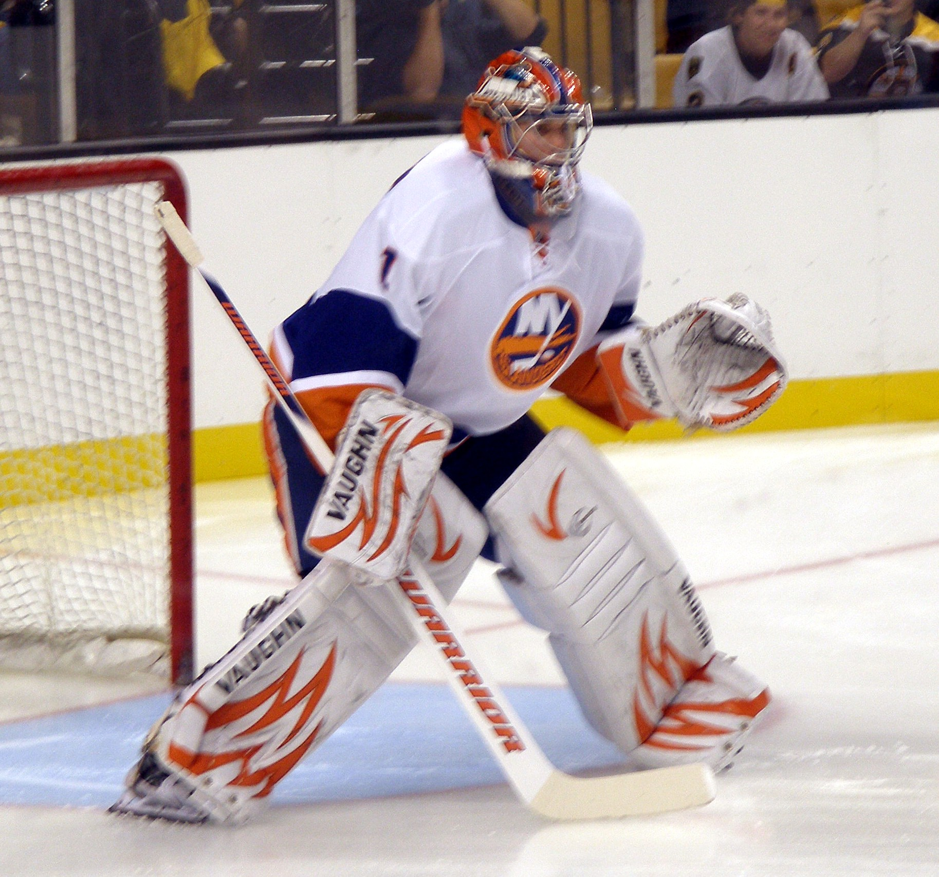 Mikko Koskinen before a rookie game between the New York Islanders and Boston Bruins